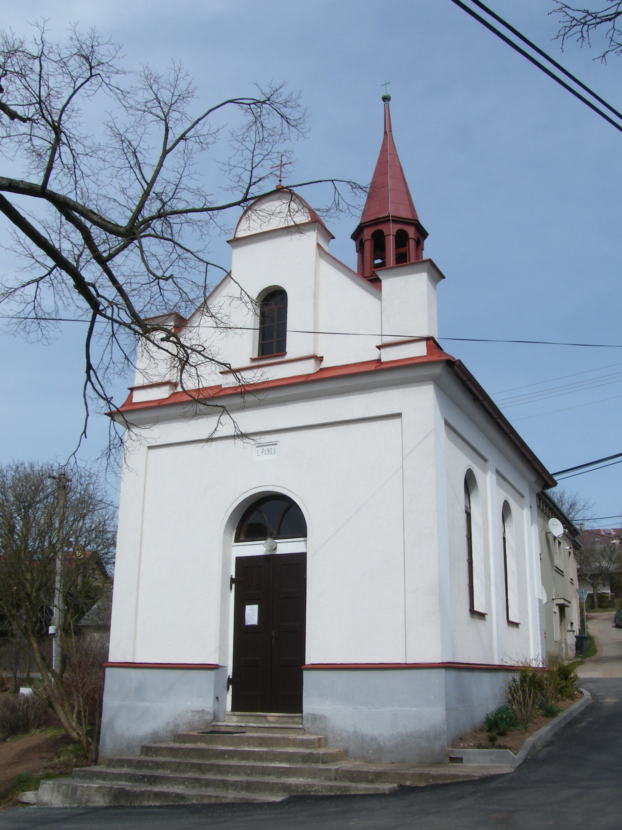 Kaple Navštívění Panny Marie v Lipí (Náchod)